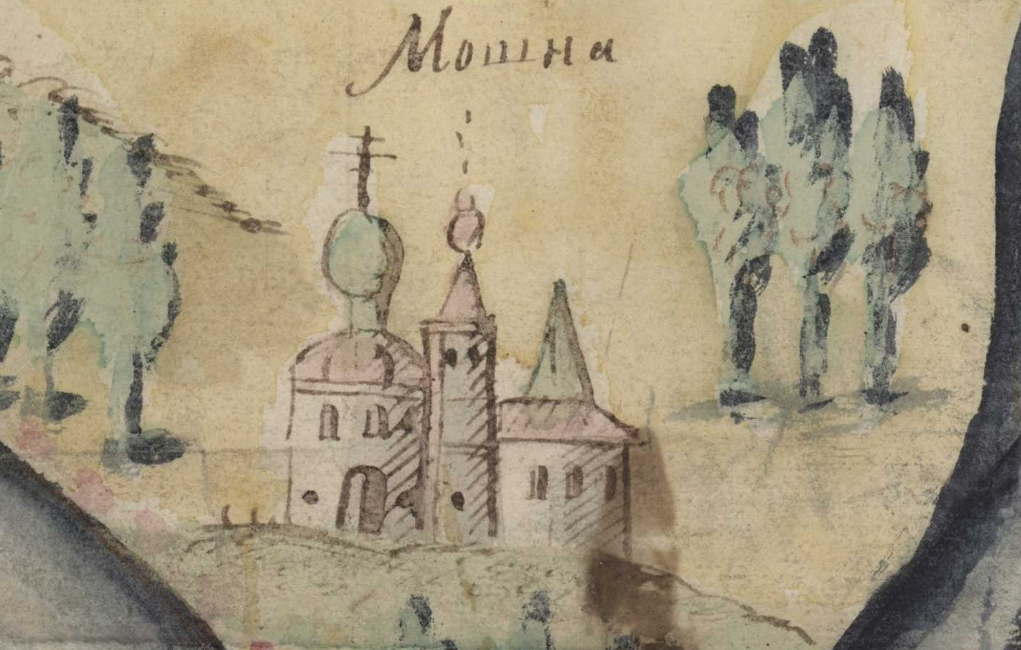 Фрагмент карти Київської губернії. XVIII століття. РГАДА, ф. 192, оп. 1, Киевская губ., № 5.